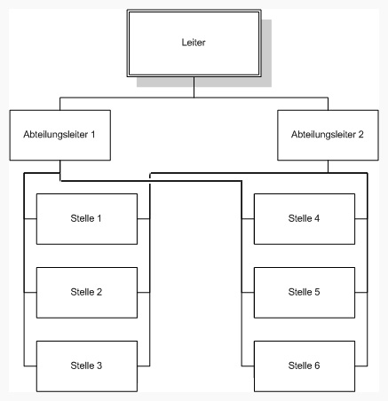 Beispiel für ein Linienorganisation mit Mehrliniensystem